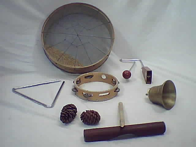 Idiophones